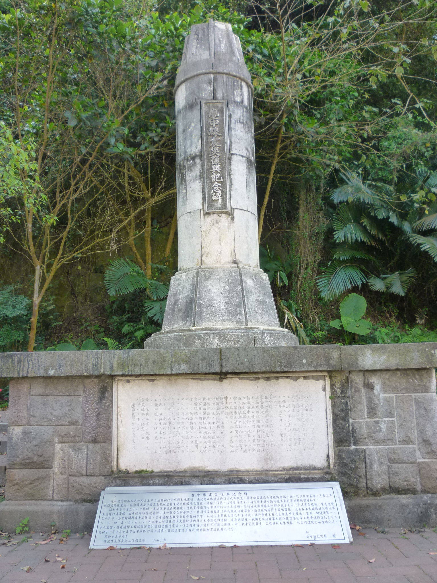 中文（台灣）: 泰安車站(舊山線)附近的「臺中線震災復興紀念碑」。